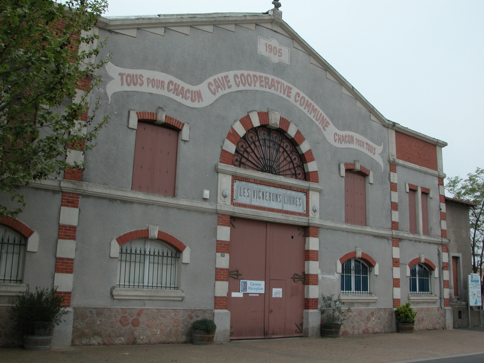 Maraussan (Hérault) - la cave cooperative vinicole.